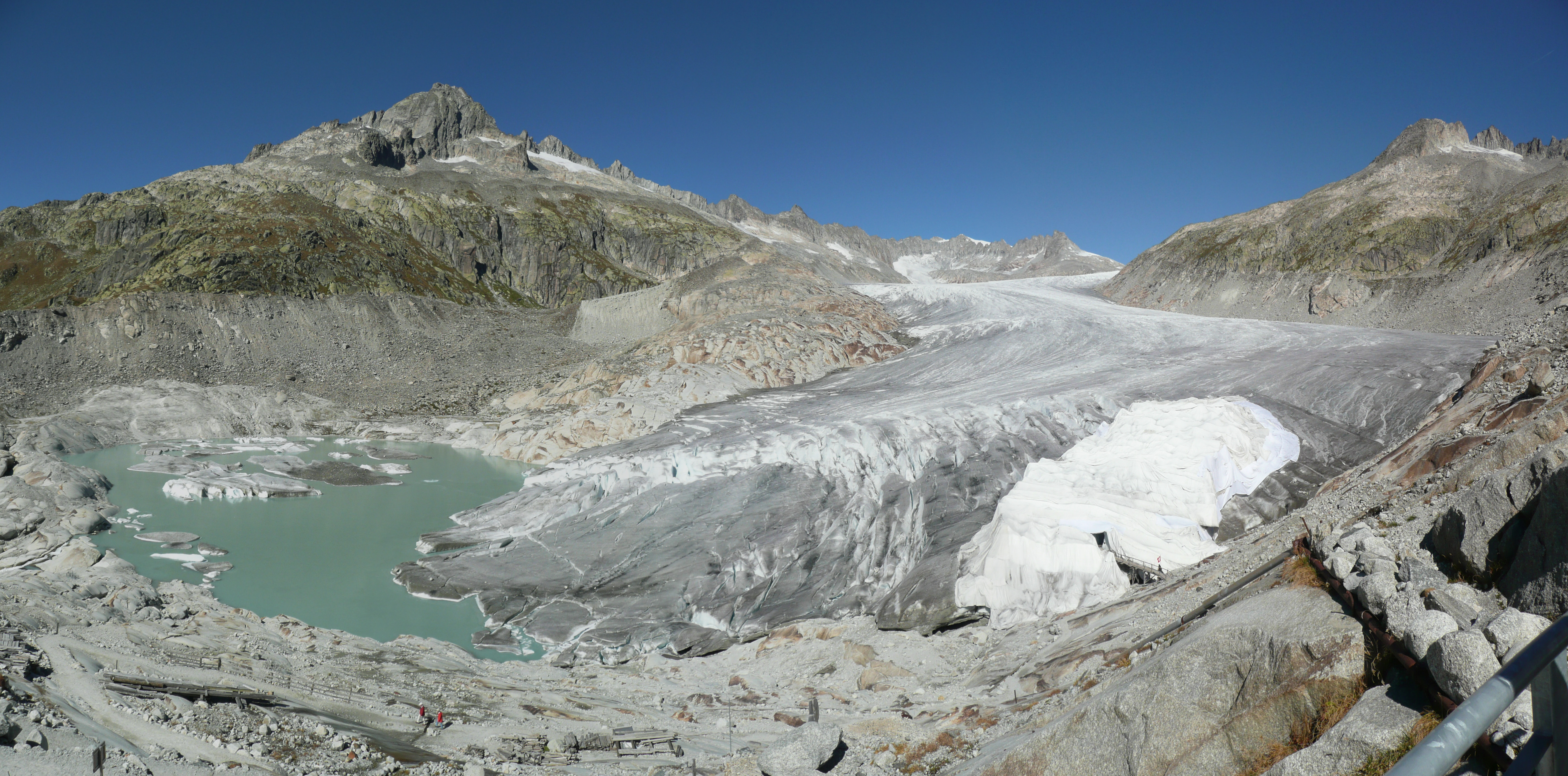 Der Rhonegletscher im September 2012 gesehen vom Weg zur Eisgrotte.